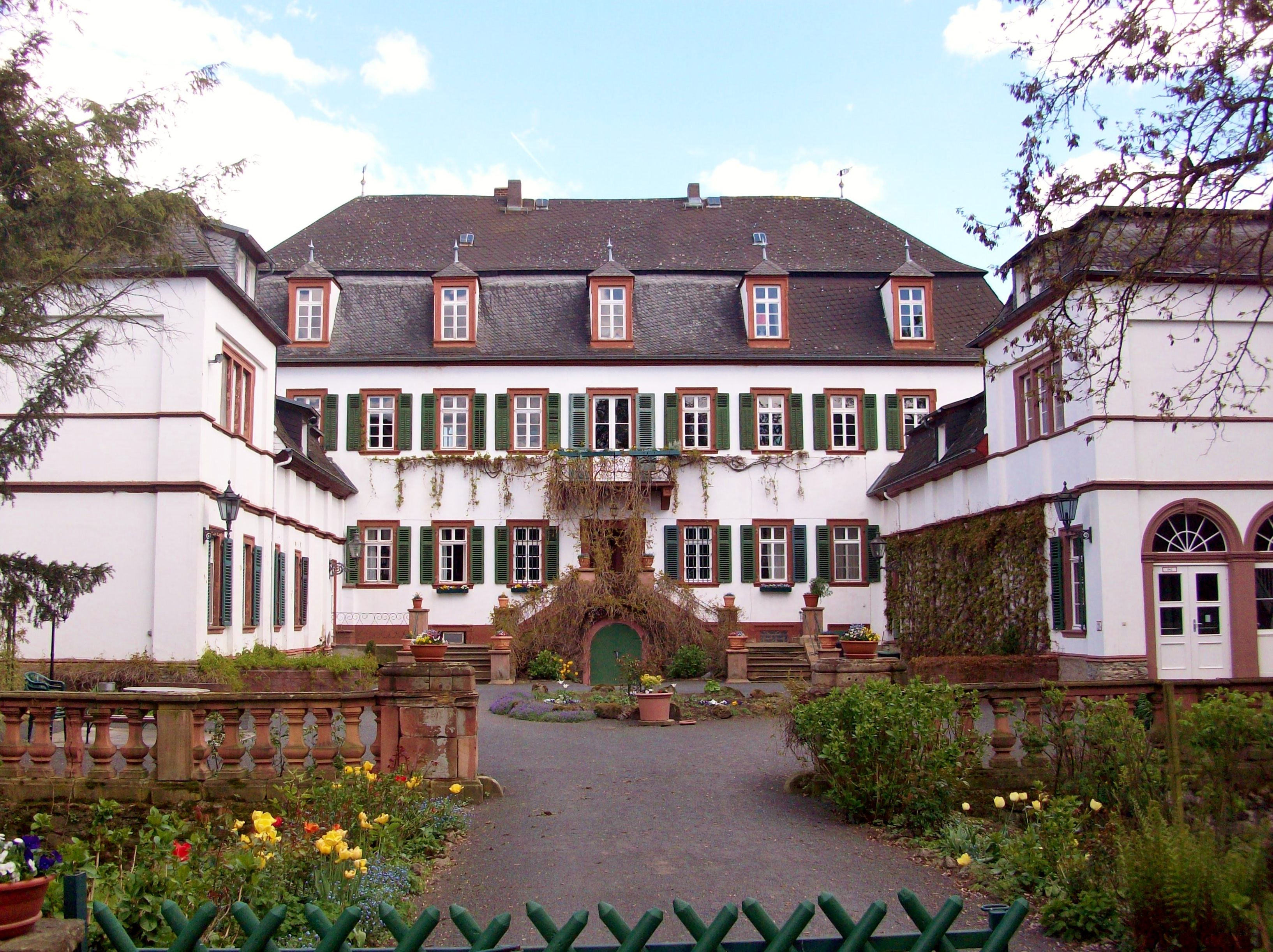 Echzeller Burg (eigentlich heute ein Schloss): Blick auf Schloss mit Seitengebäuden